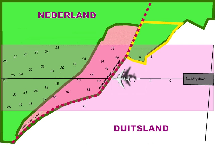 Kaart met de ligging van het Schinvelderbos, gekapt met gebruik van de NIMBY-procedure, ten opzichte van de obstakelvrije aanvliegroute, met toegestane boomhoogte.